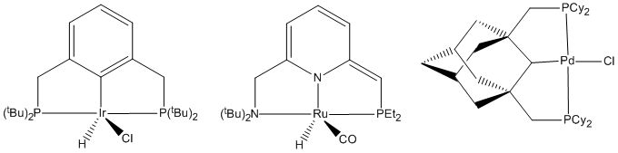 Beispiele einiger Pincer-Komplexe